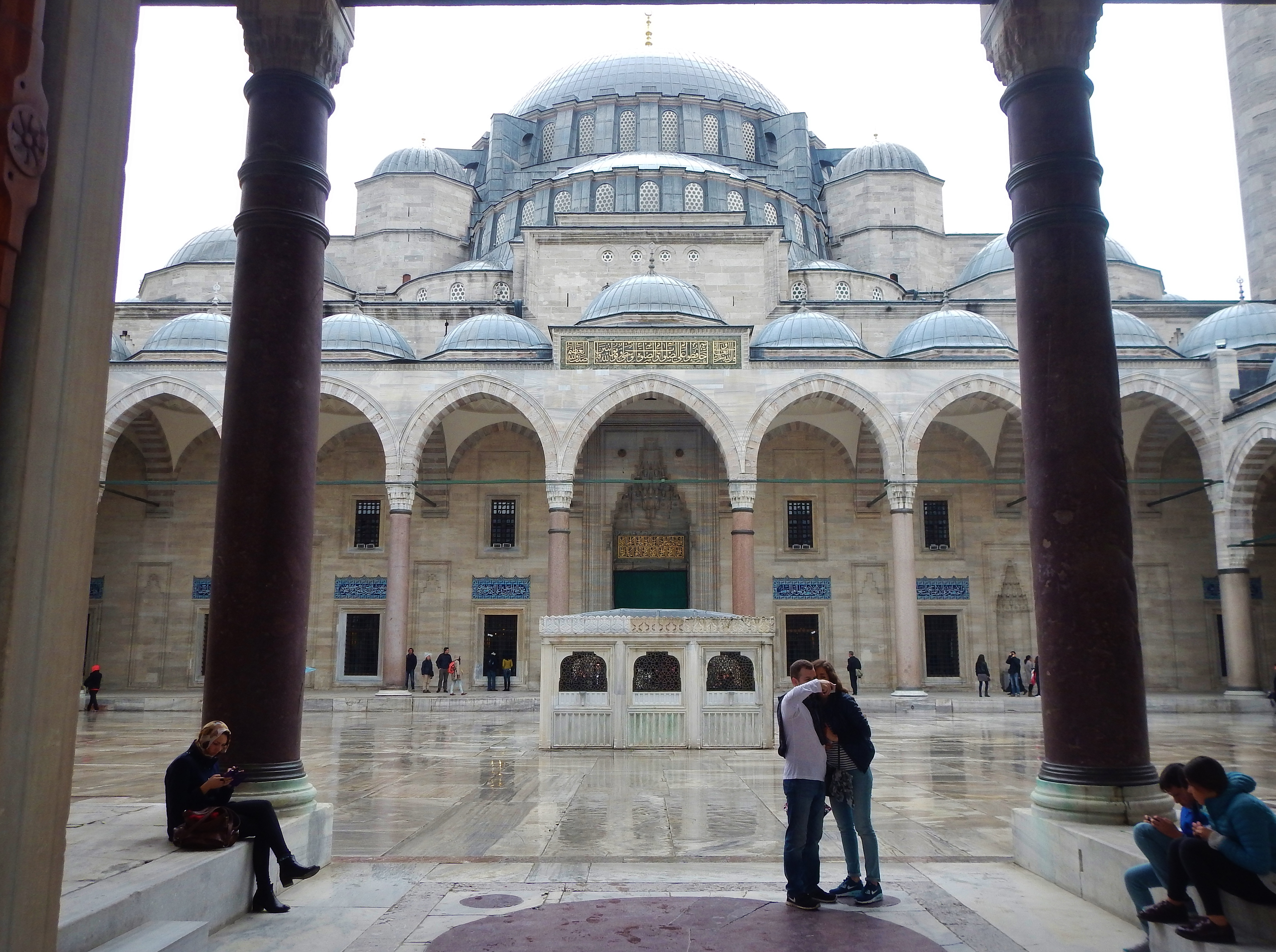 Süleymaniye Cami, Süleymaniye Moschee